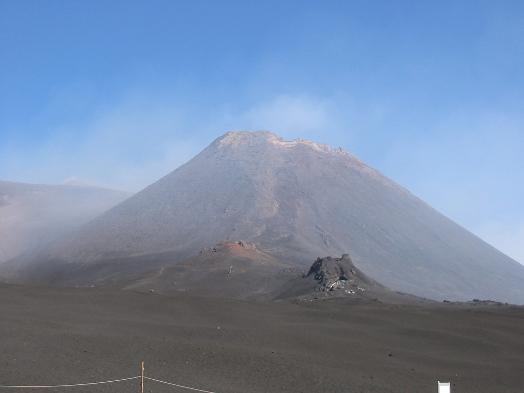 Etna from 2900 meters